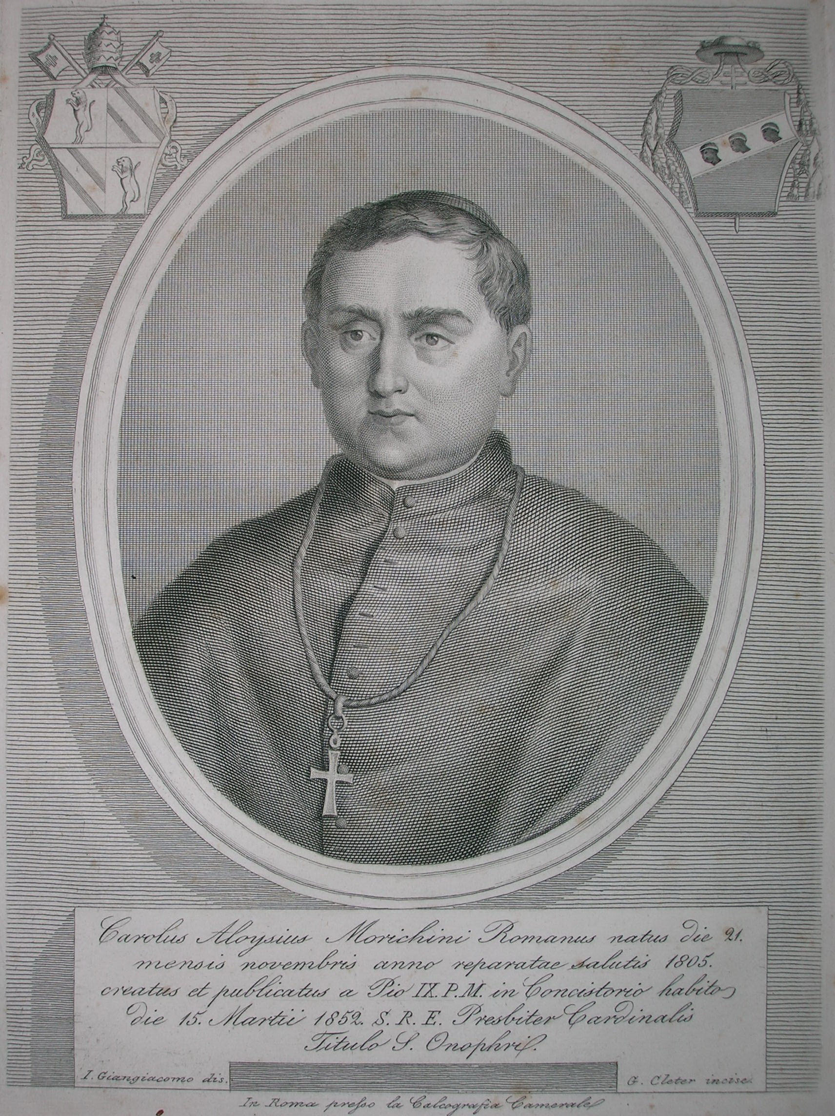 Cardinal Morichini (1805 – 1879), cardinale e vescovo cattolico italiano, Calcografia Camerale, Roma, ca. 1870.